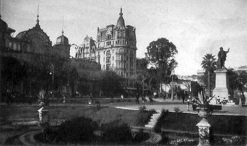 Postal enviada en 1919 de la Plaza Libertad en Buenos Aires, viendo hacia la esquina de Cerrito y Marcelo T. de Alvear. Se ve a la izquierda el antiguo Teatro Coliseo (demolido) y al centro una hilera de edificios que fueron demolidos cuando se abrió la Avenida 9 de Julio, en 1971.